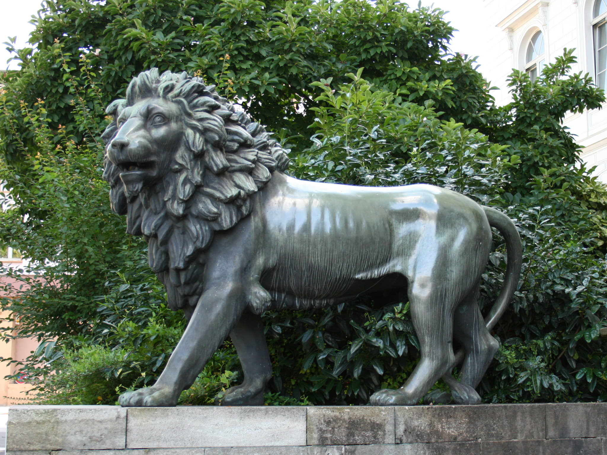 Löwenstatuen vor der ehemaligen Bundesbahndirektion in Wuppertal